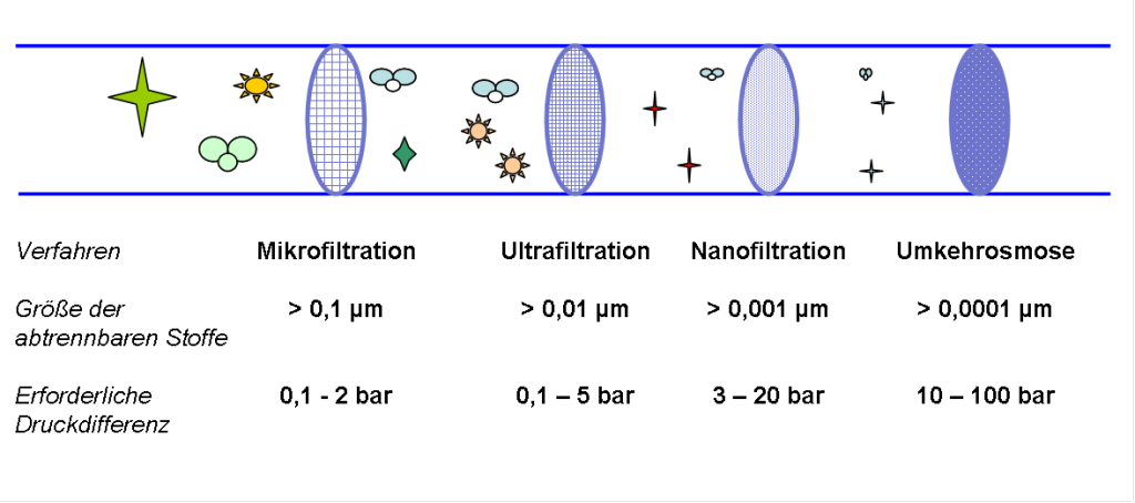 Übersicht über die verschiedenen Membranfiltration Verfahren Selbst erstellt